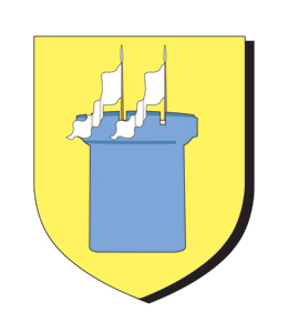 Escudo desconocido, sin referencias Erik Mariñelarena (Erik Mariñelarena), derechos donados en (2005)